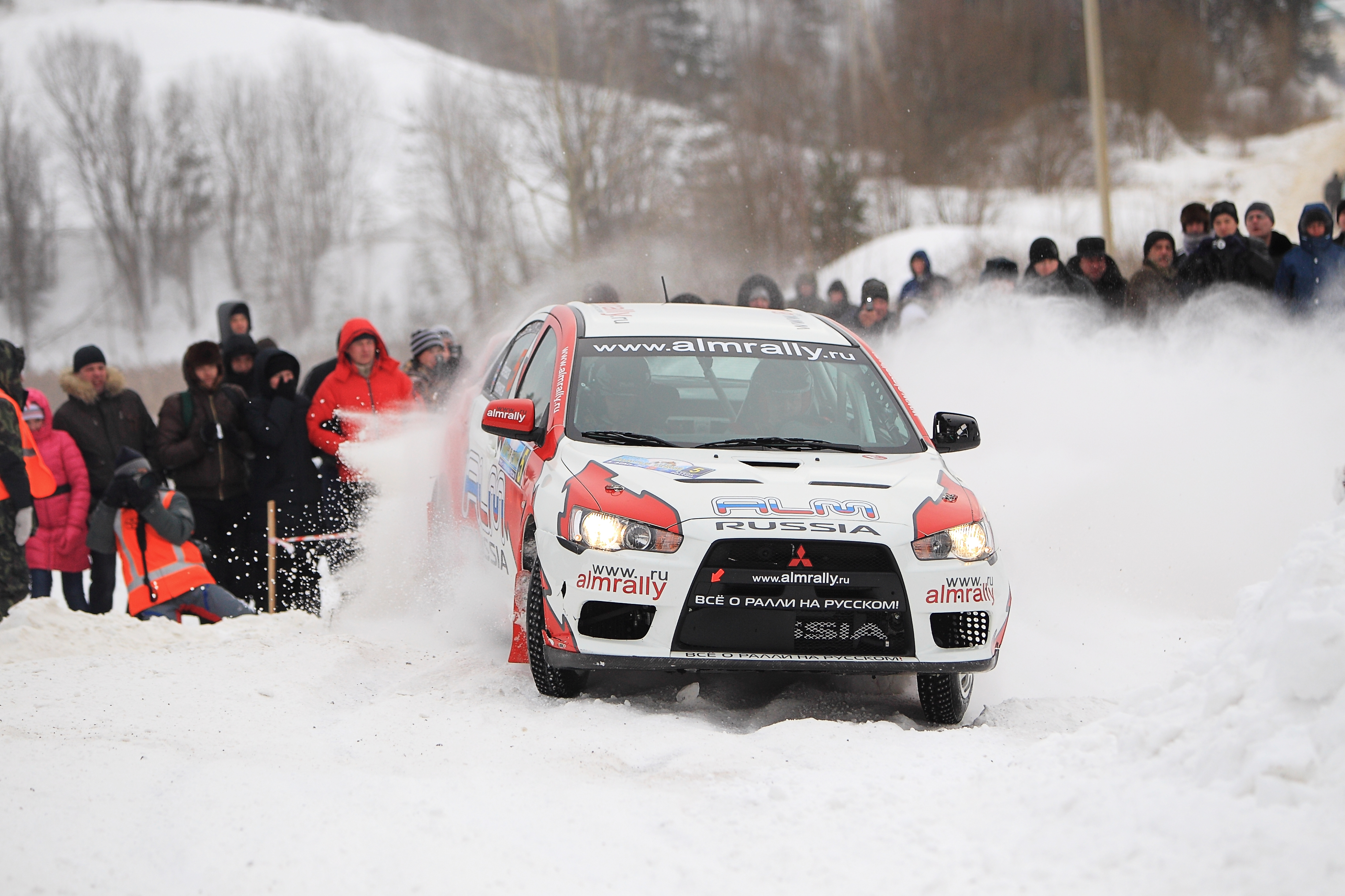 Mitsubishi Lancer Evo X - Михаил Лепехов/ Евгений Новиков на зимнем ралли "Золотые Купола 2012" в Ярославской области в районе города Ростов Великий.